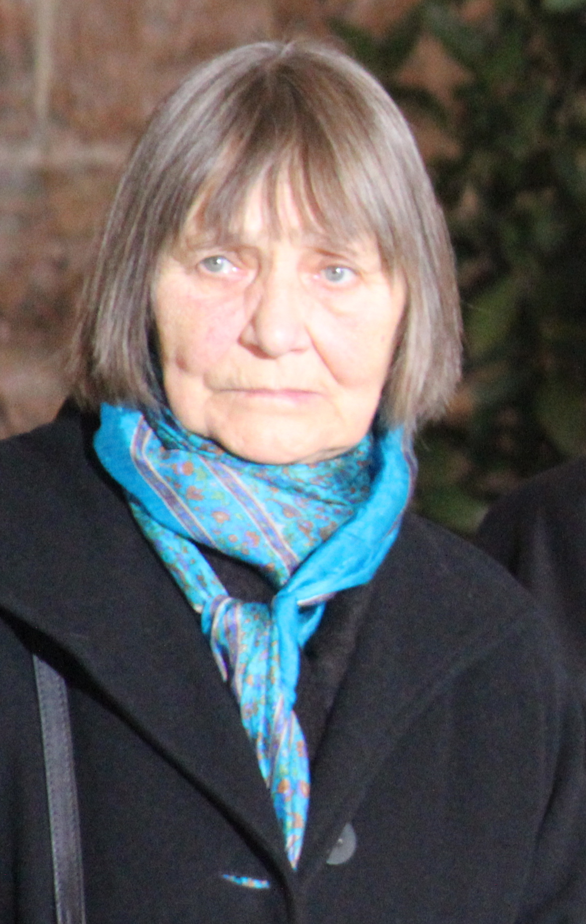 Dana Němcová při rozloučení s Václavem Havlem, Vladislavský sál Pražského hradu, 21. 12. 2011 This photograph was taken with a DSLR from WMCZ's Camera grant.